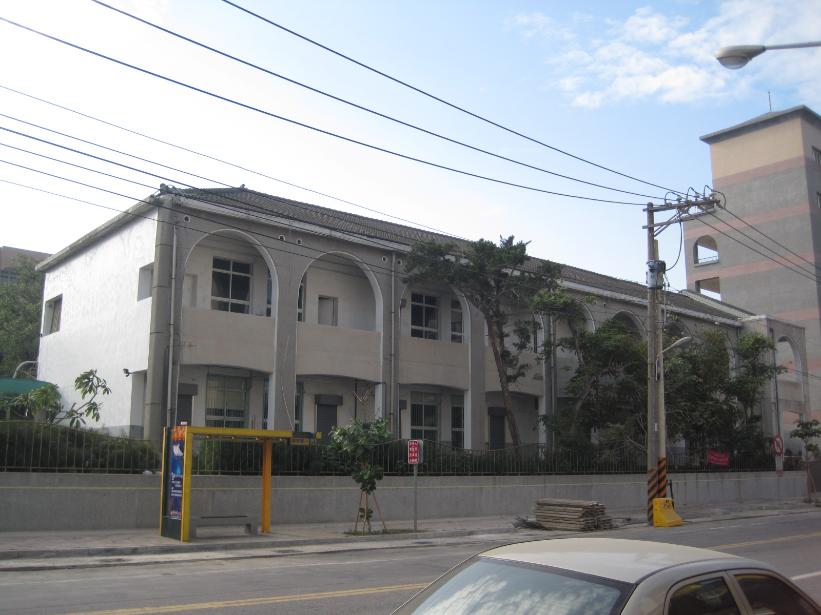 臺灣高雄市旗津國小建於日治時期的校舍建築。